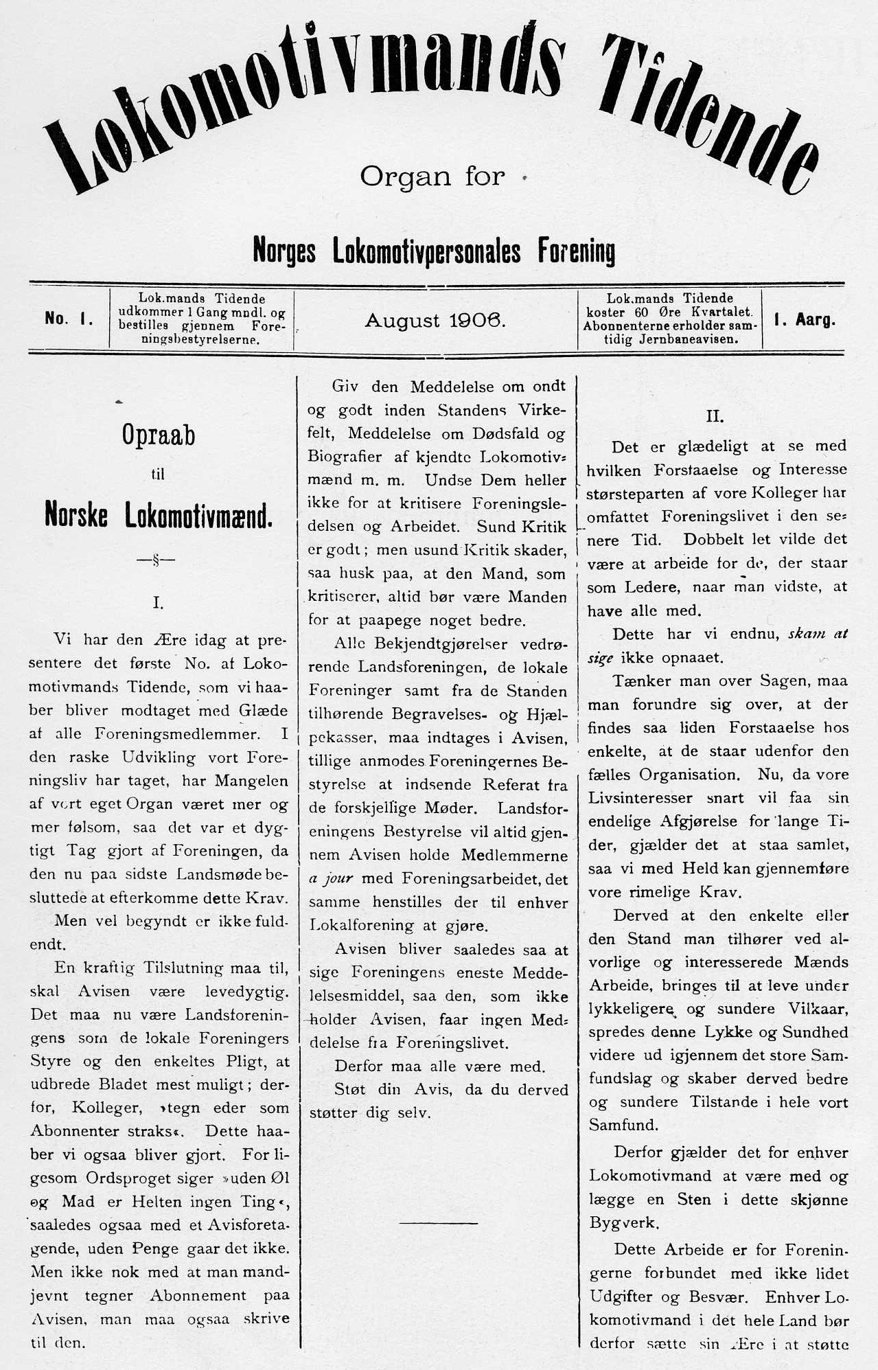 Forsiden på første nr av Lokomotivmands Tidende august 1906